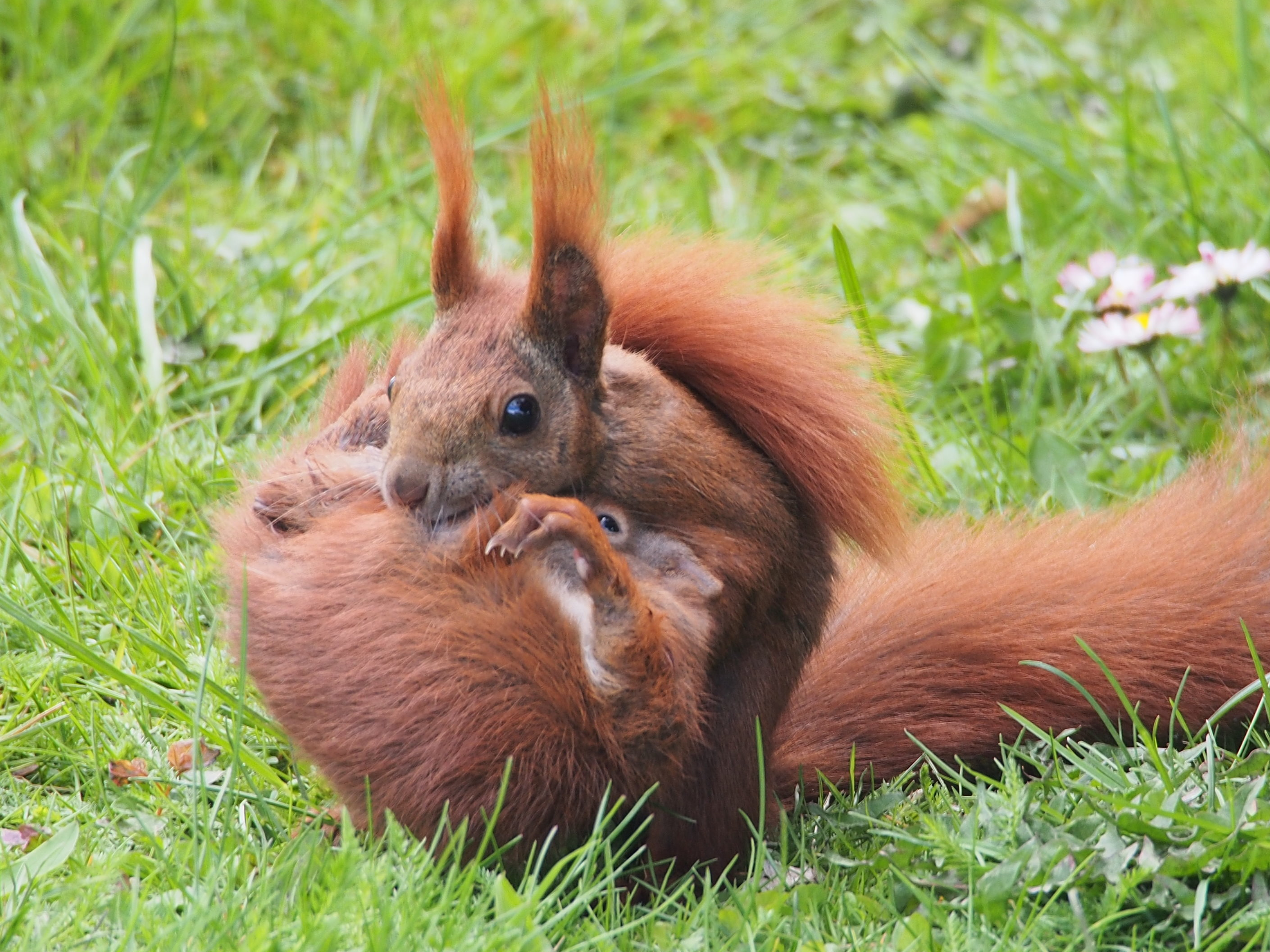 Tragestarre beim Transport eines jungen Eichhörnchens (Sciurus vulgaris) durch das Elterntier.